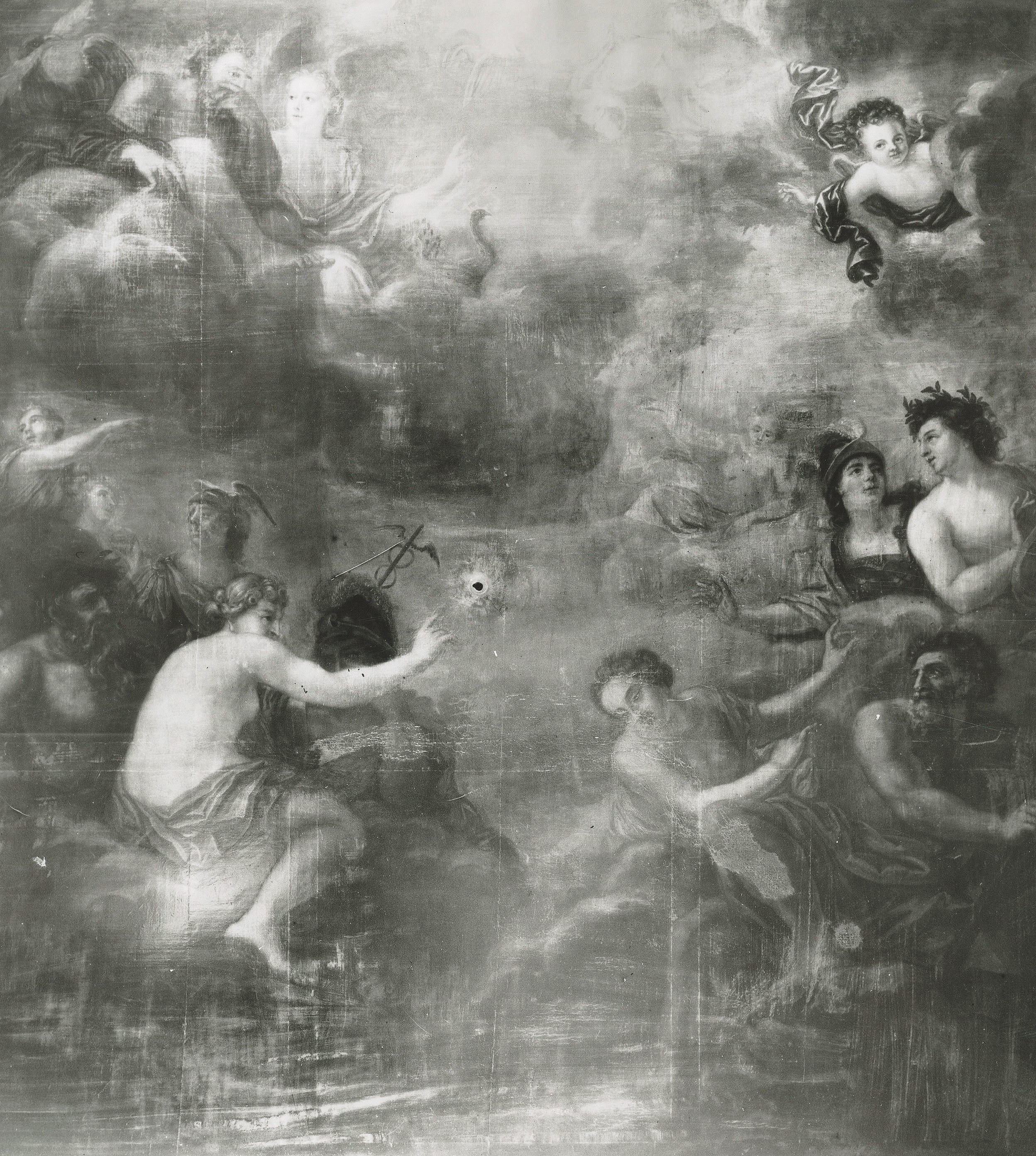 Loheska huset i Kvarteret Ulysses. Plafond i salongen våning 1 trappa, Stora Nygatan 21B.